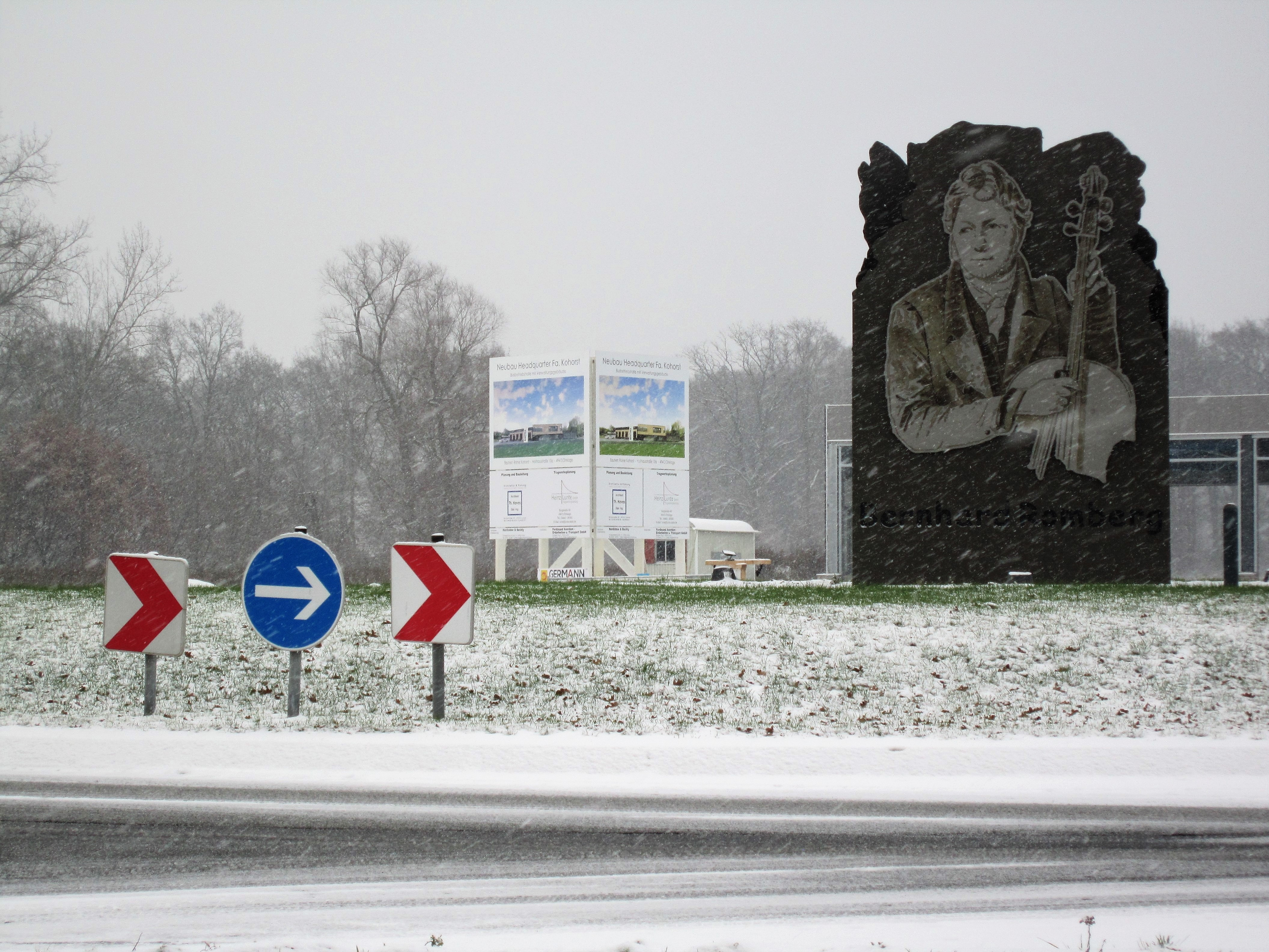 Kreisel Märschendorfer Straße / Dinklager Ring mit dem Abbild von Bernhard Romberg in Dinklage / Bahlen